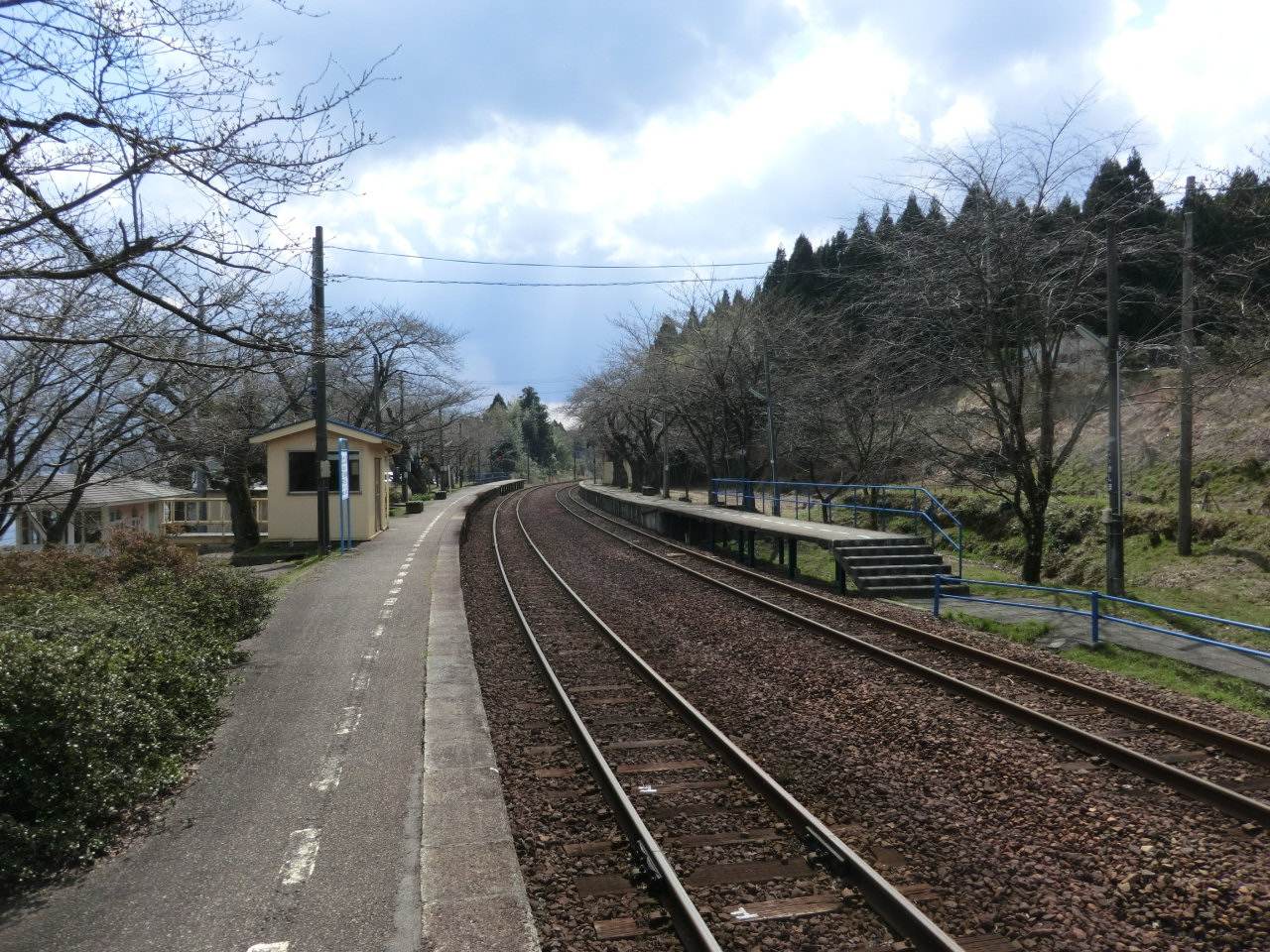 能登鹿島駅 ホーム北端より